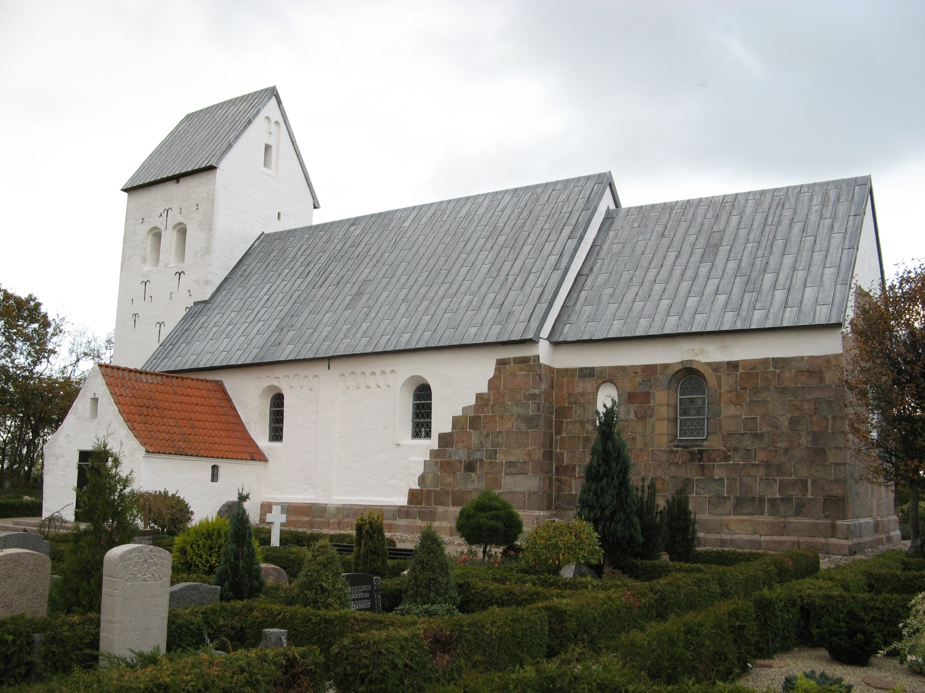 Alslev Kirke, Alslev sogn, Varde kommune (former: Skads Herred, Ribe Amt). Kirken set fra sydvest